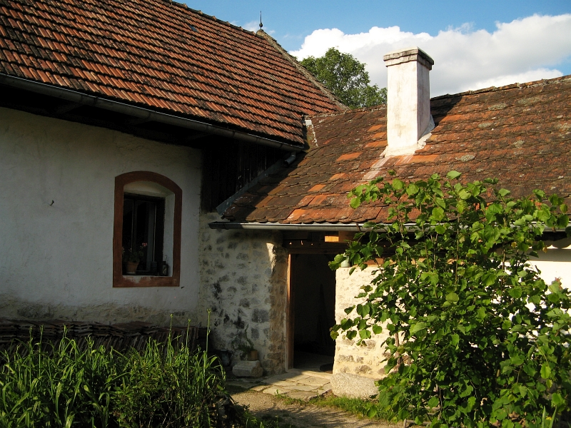 Usedlost čp. 3, Přísečno 3